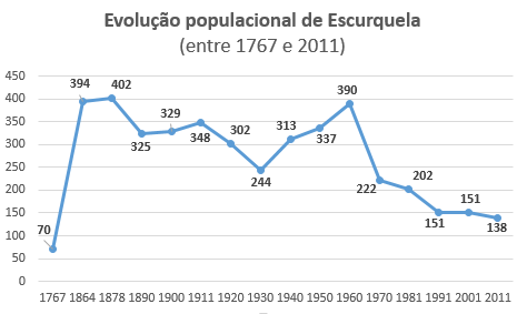 Evolução populacional de Escurquela de 1767 a 2011